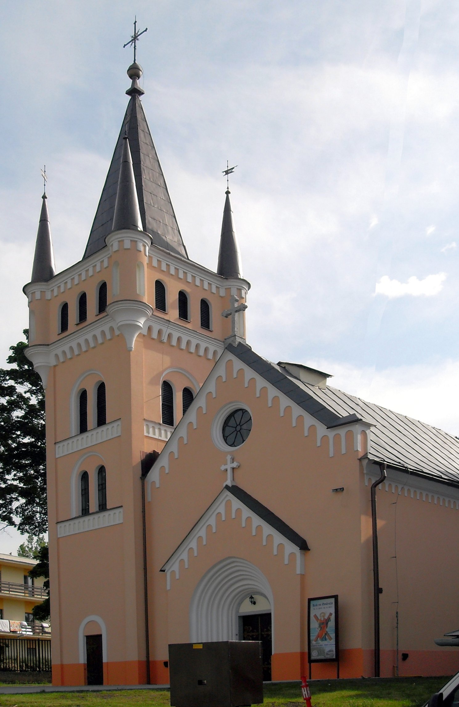 Šemša, Rímskokatolícky kostol sv. Ondreja